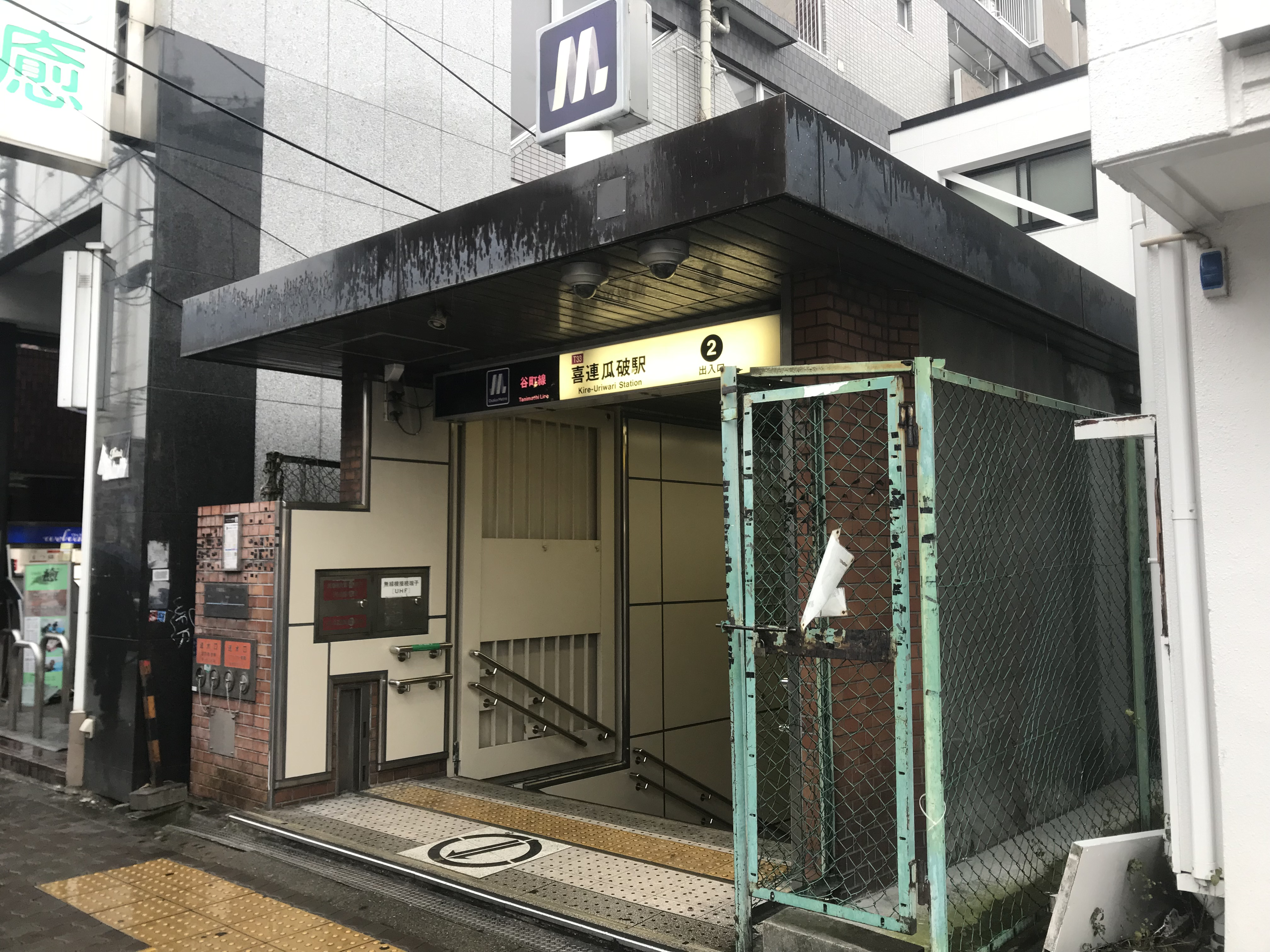 喜連瓜破駅の2番出入り口